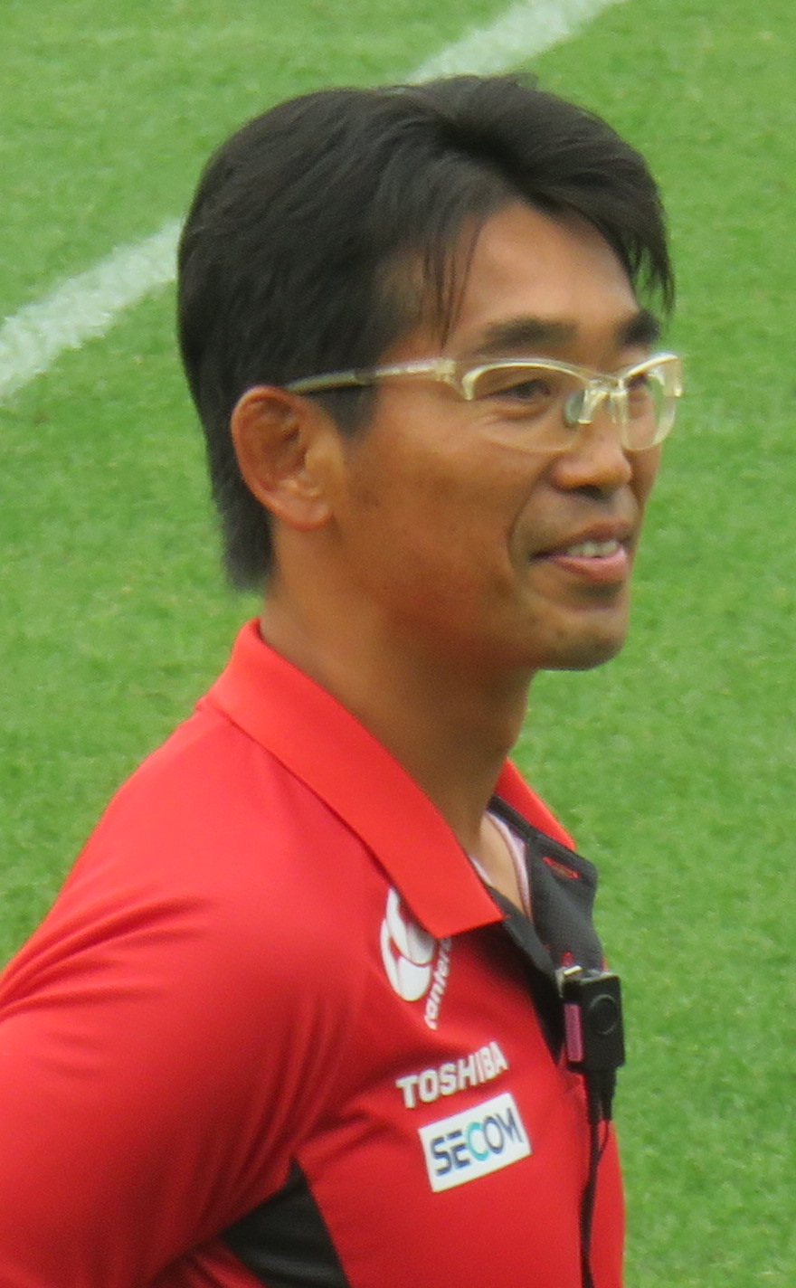 ラグビー日本代表・中竹竜二ヘッドコーチ代行（アジアラグビーチャンピオンシップ2016）